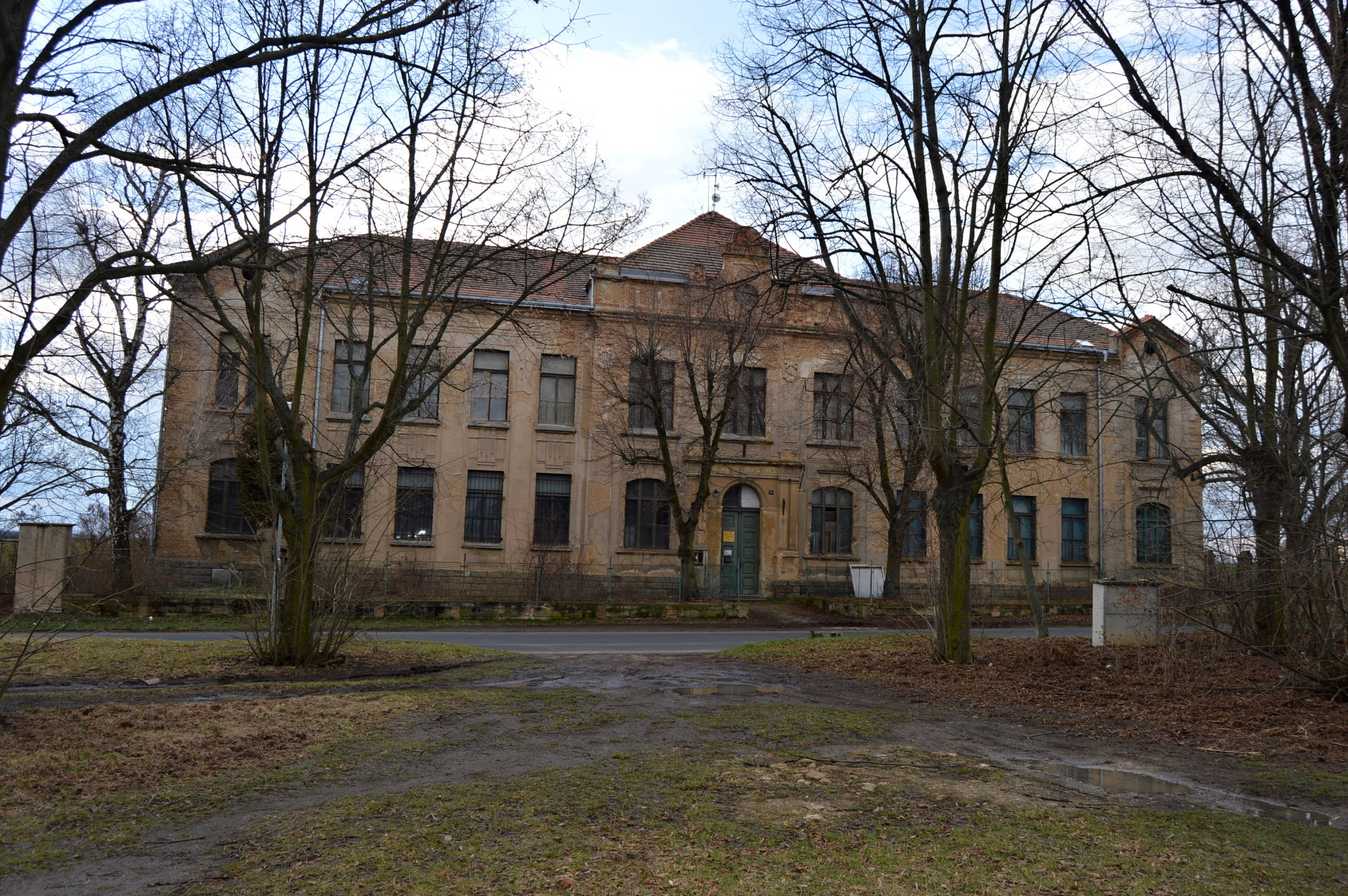 Radešín škola